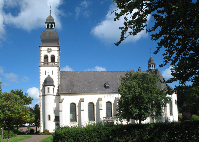 St. Viter Kirche mit auffälligem Zwiebelturm bei Rheda-Wiedenbrück(Kreis Gütersloh)